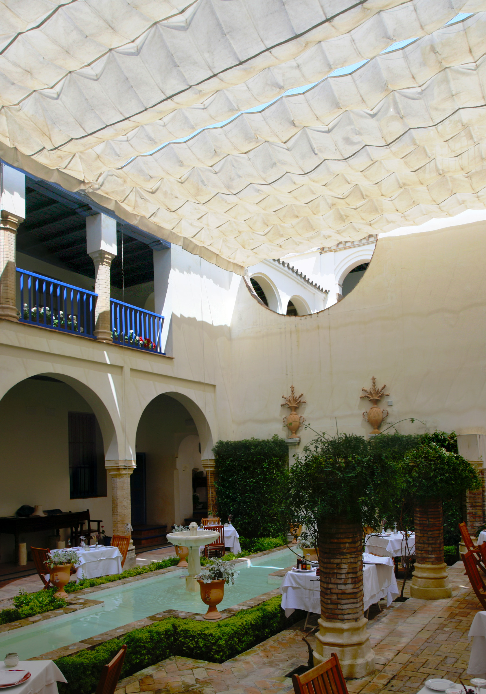 Córdoba (España).